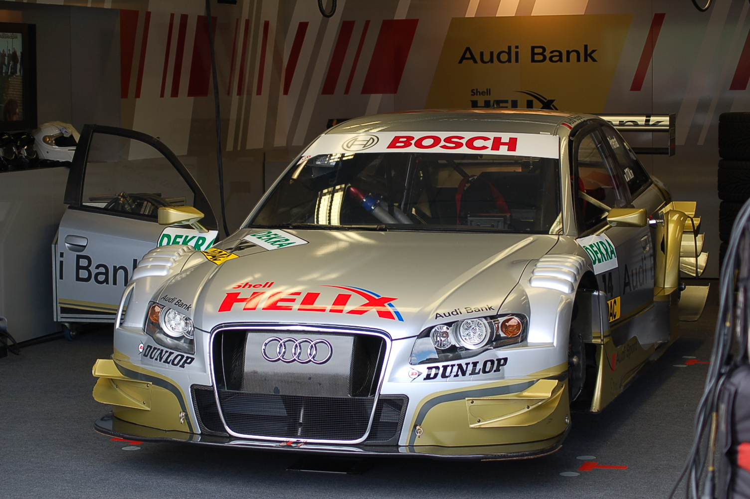 Alexandre Prémat beim DTM-Lauf in Oschersleben 2008